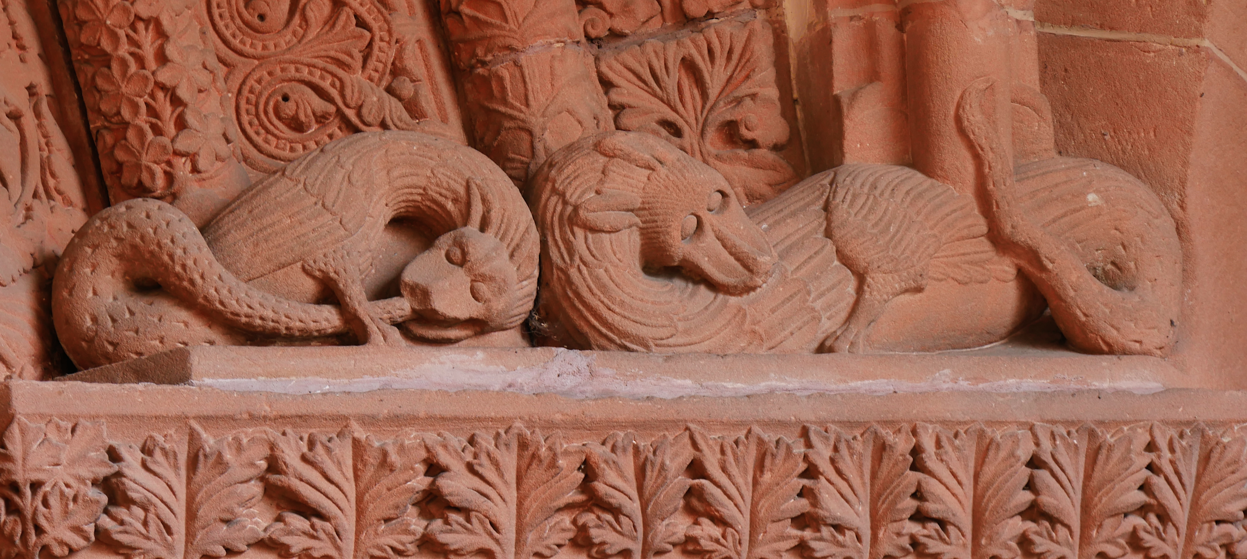 Ehemalige Prämonstratenserinnenklosterkirche St. Norbert in Enkenbach (Pfalz) - Drachen rechts vom Tympanon